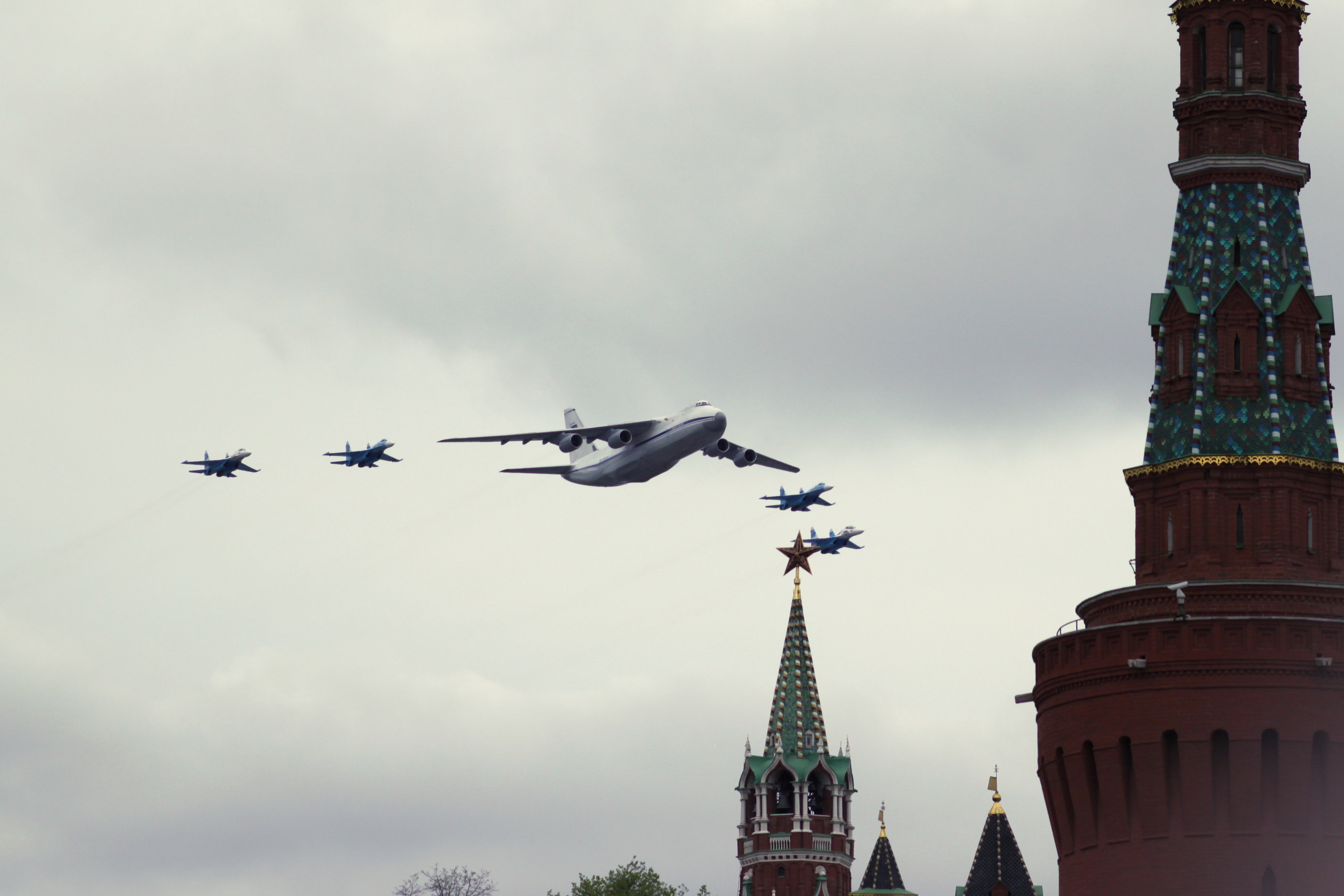 Репетиция парада Победы 6 мая 2010 года. Транспортный самолёт Ан-124 («Руслан») в сопровождении четырех истребителей Су-27.